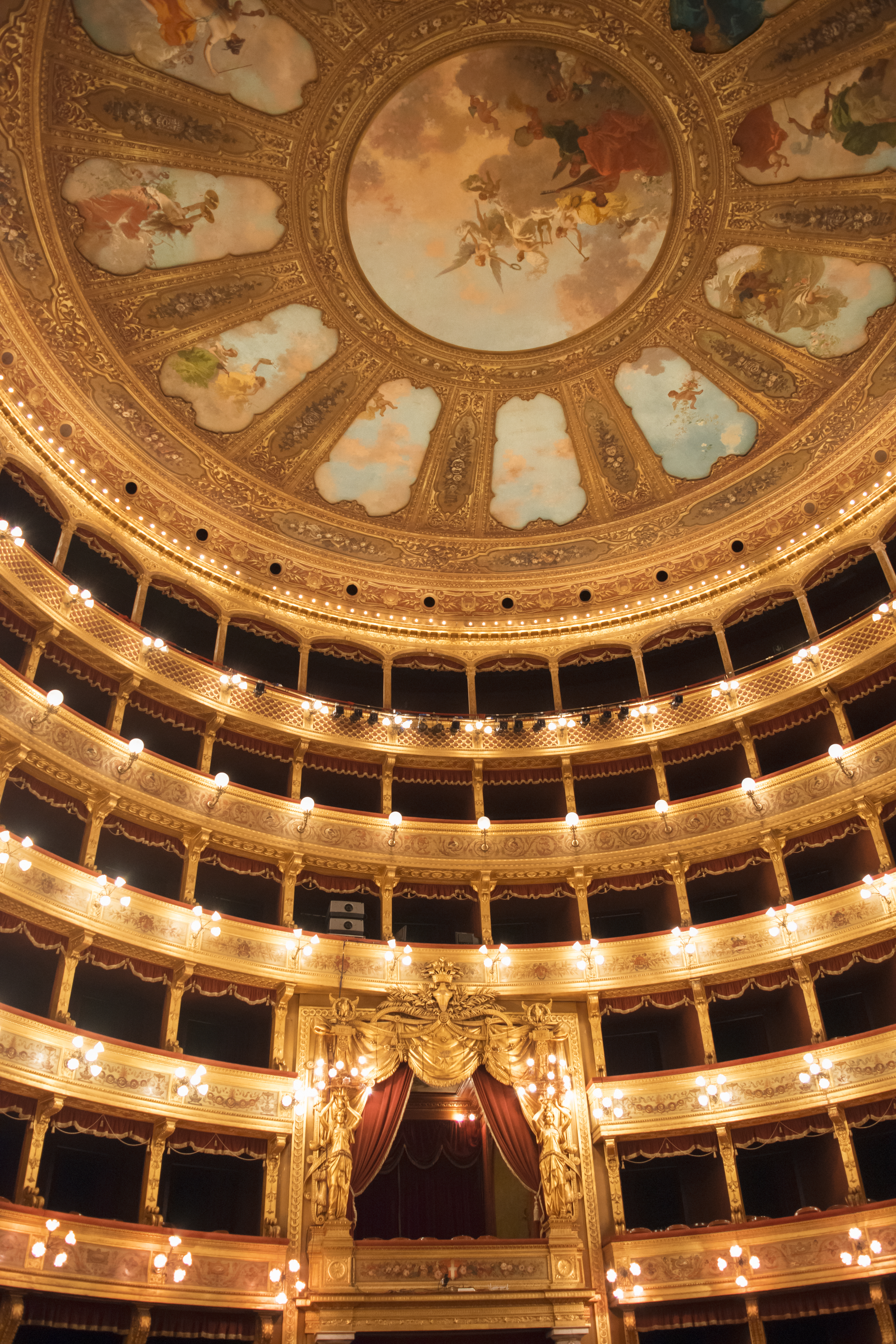 Il Teatro Massimo, all'epoca della sua inaugurazione era con i suoi 7730 metri quadrati di area, era il terzo teatro più grande d'Europa. This is a photo of a monument which is part of cultural heritage of Italy.